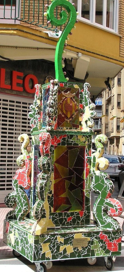 Gaiata con recubrimiento de trencadis cerámico, 4m de altura 1,2m de diametro e iluminación mediante leds.